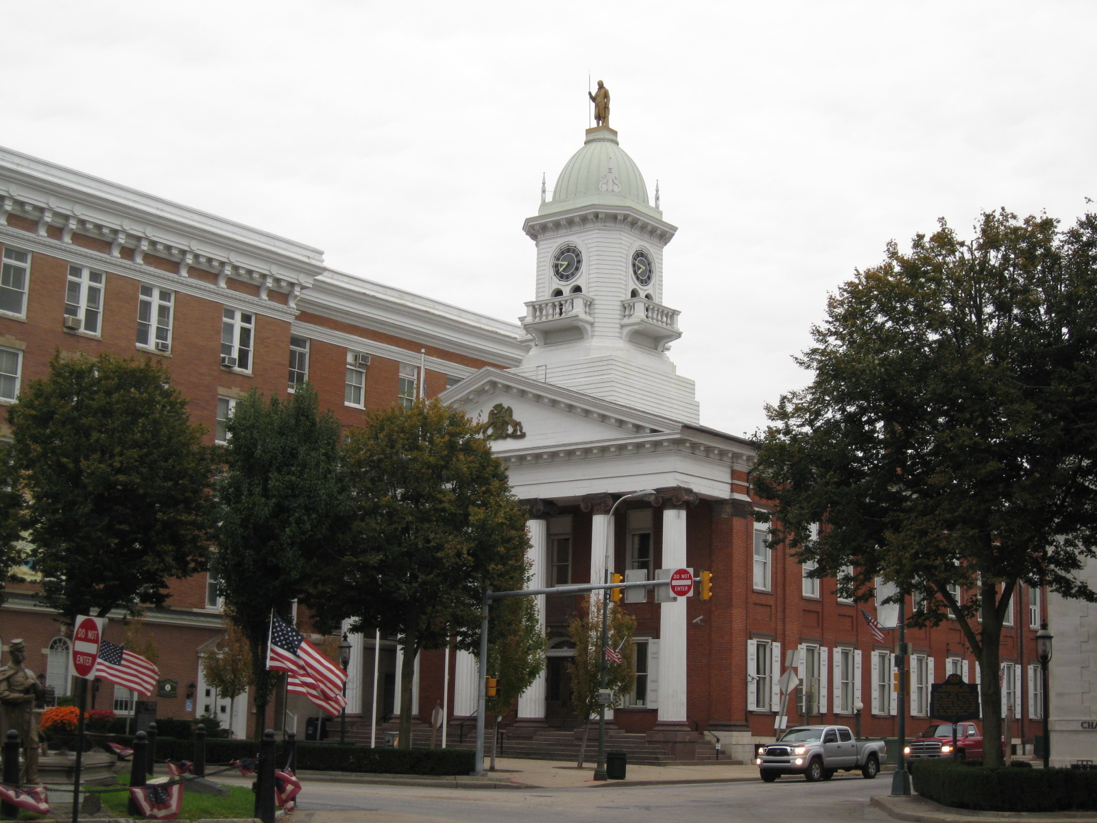 Chambersburg, Pennsylvania